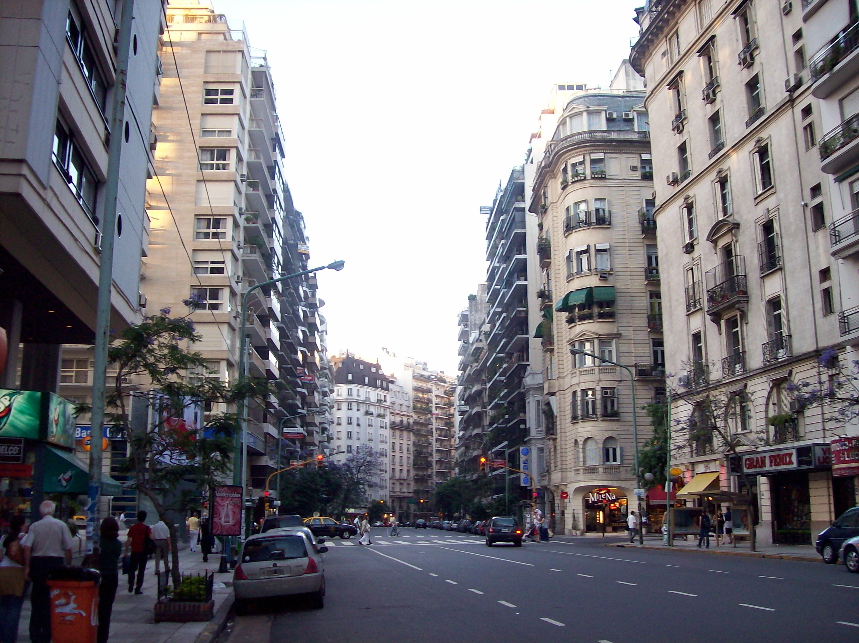 Avenida Callao al 1200, en la Ciudad de Buenos Aires. El primer cruce que se observa es con Juncal (al fondo, la curva en Pacheco de Melo) Tomada de SSO a NNE